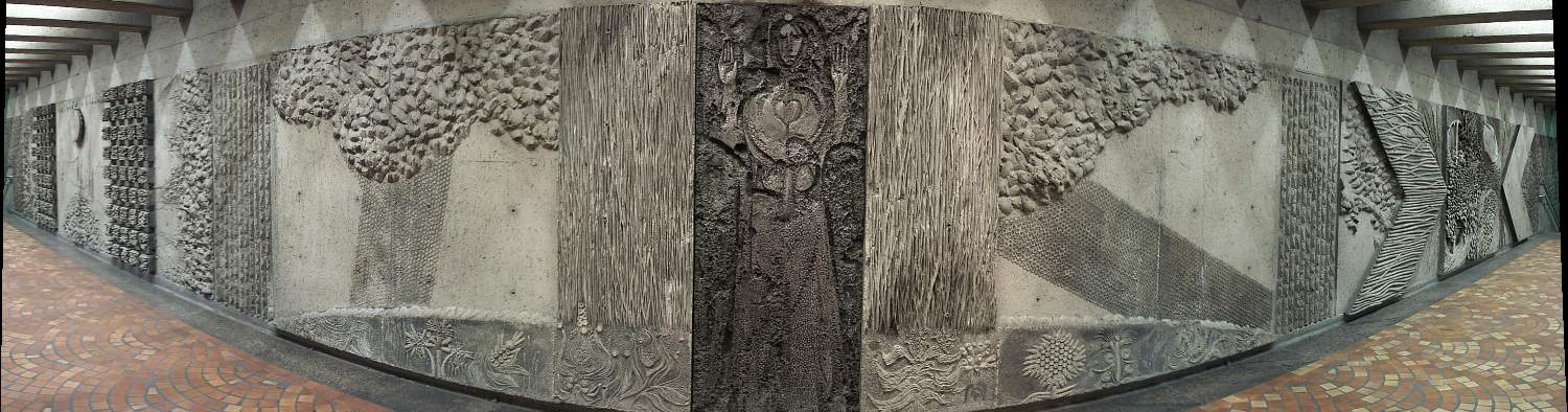 Panoramic view of Citius, Altius, Fortius, a series of three reliefs by Jordi Bonet at Pie-IX metro station in Montreal. Vue panoramique de Citius, Altius, Fortius, une série de trois reliefs de Jordi Bonet à la station de métro Pie-IX à Montréal. Vista panorámica de Citius, Altius, Fortius, série de tres esculturas murales de Jordi Bonet a la estación Pie-IX del metro de Montreal. Panoramo de Citius, Altius, Fortius, aro de tri murskulpturoj de Jordi Bonet, en la stacidomo Pie-IX de la metroo de Montrealo.